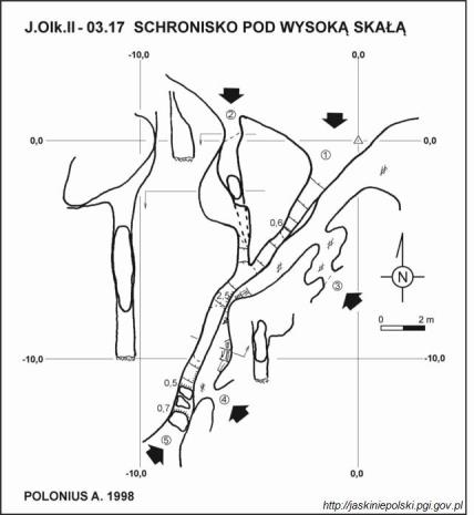 Schronisko pod Wysoką Skałą - plan